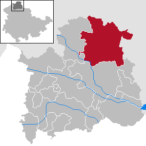 Harztor im Landkreis Nordhausen, Thüringen